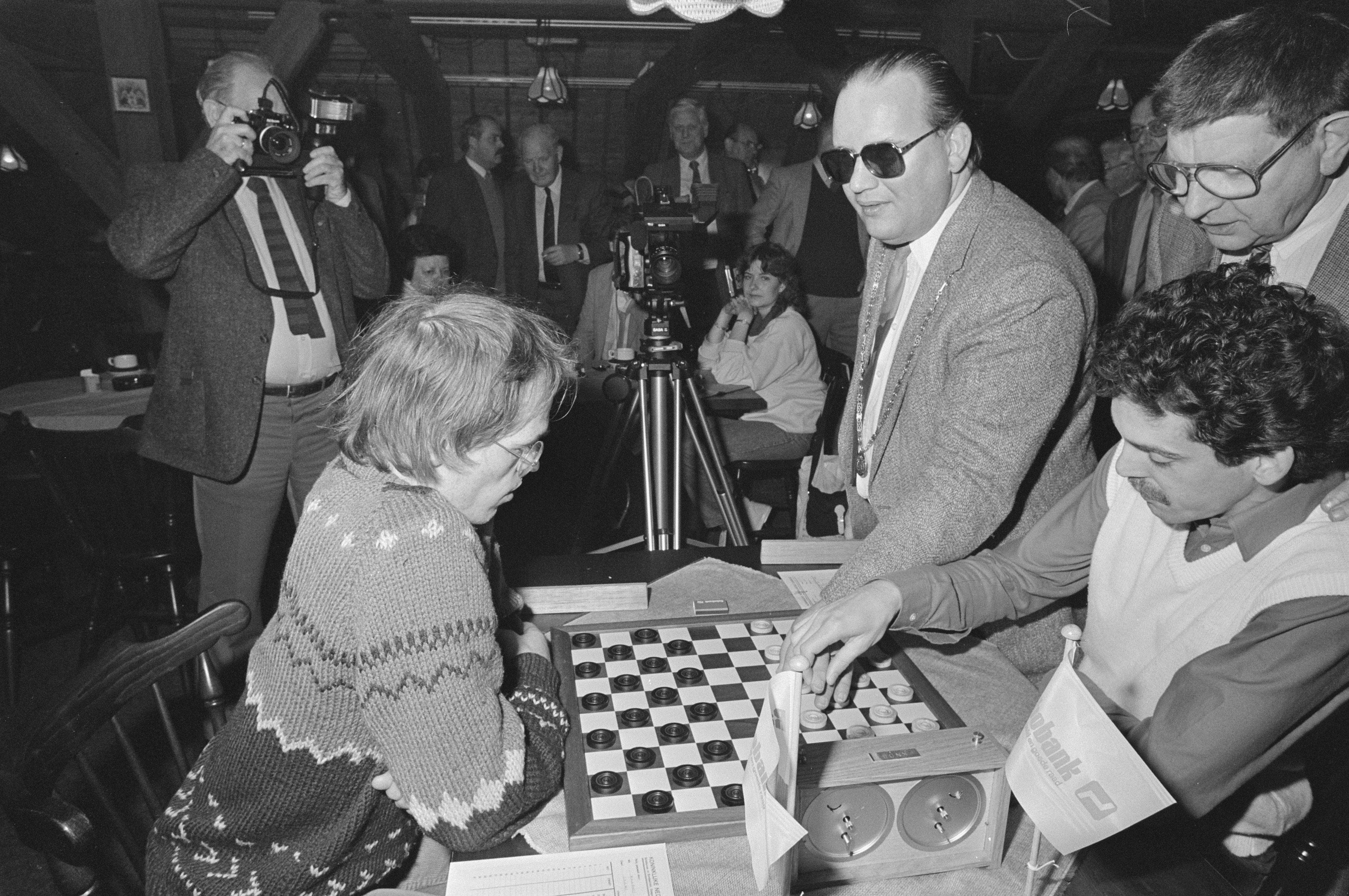 Collectie / Archief : Fotocollectie Anefo Reportage / Serie : [ onbekend ] Beschrijving : NK dammen in Abcoude; burgemeester Bestman doet eerste zet voor partij Van der Wal (l) en Van der Kooij Datum : 2 april 1985 Trefwoorden : DAMMEN, burgemeesters Fotograaf : Bogaerts, Rob / Anefo Auteursrechthebbende : Nationaal Archief Materiaalsoort : Negatief (zwart/wit) Nummer archiefinventaris : bekijk toegang 2.24.01.05 Bestanddeelnummer : 933-2834